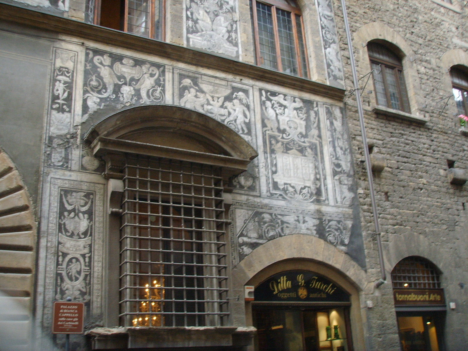 Palazzo di bianca cappello, graffiti